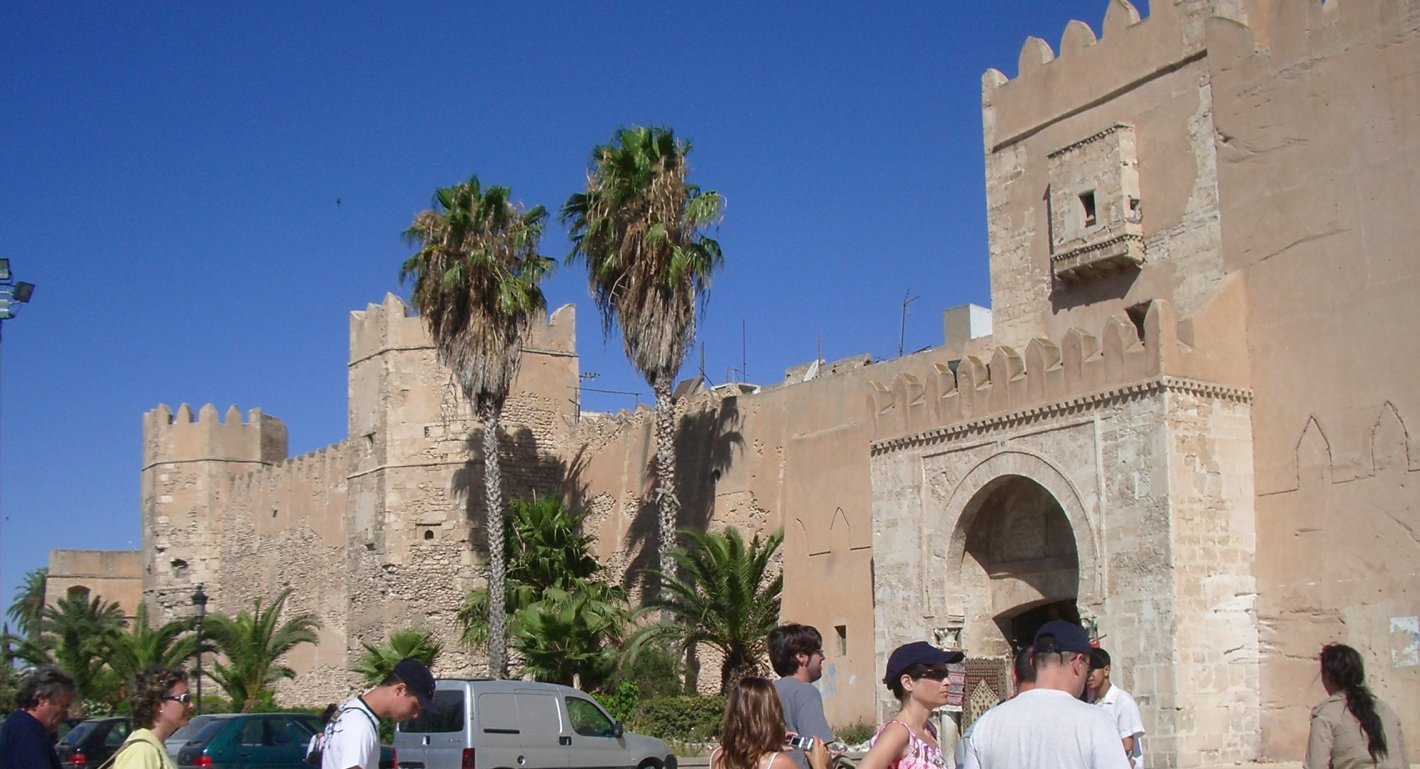 centre de Sfax